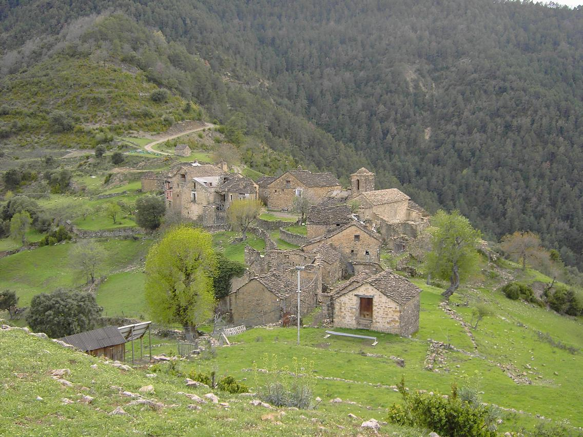 El despoblado de Moriello de Sampietro, en la boca del Valle de Vió, perteneciente al municipio de Boltaña.